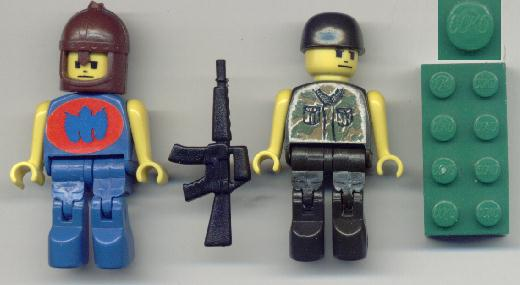 Mattoncini e personaggi COKO, una copia Cinese dei LEGO. Pezzi originali, digitalizzati e caricati su Wikipedia da MH, 09:16, 25 Agosto 2004 (UTC)